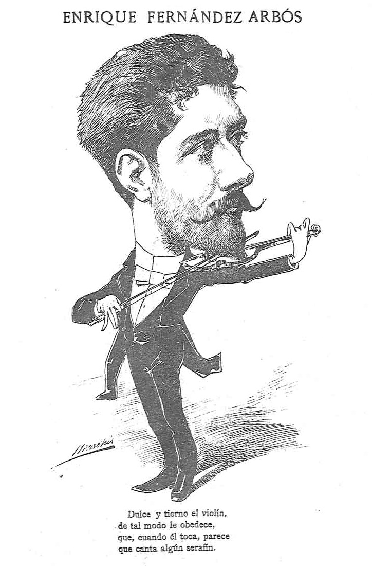 Enrique Fernández Arbós.